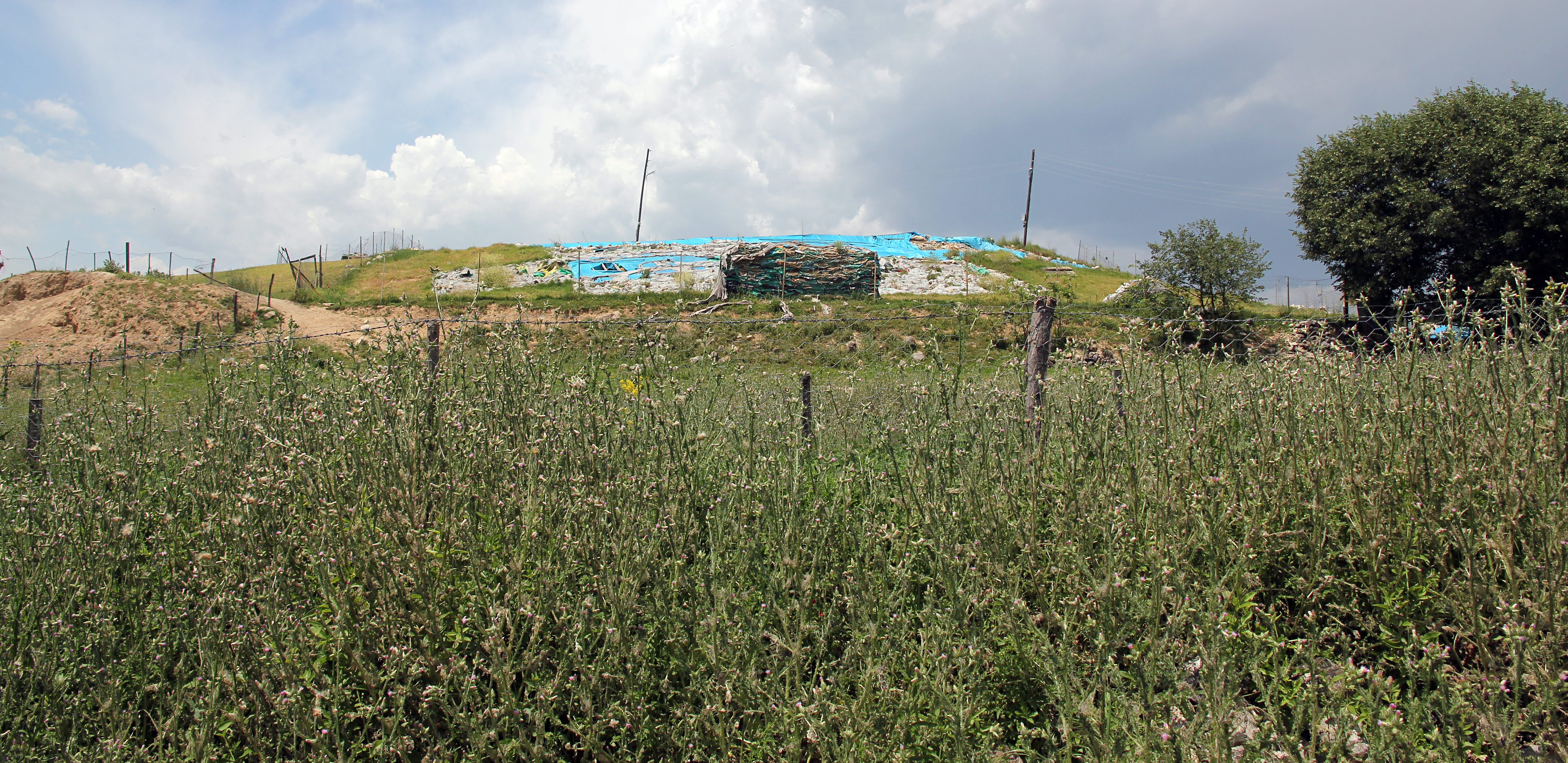 Oymaağac Höyük, Siedlungshügel in der Nordtürkei, wahrscheinlich Standort der hethitischen Stadt Nerik